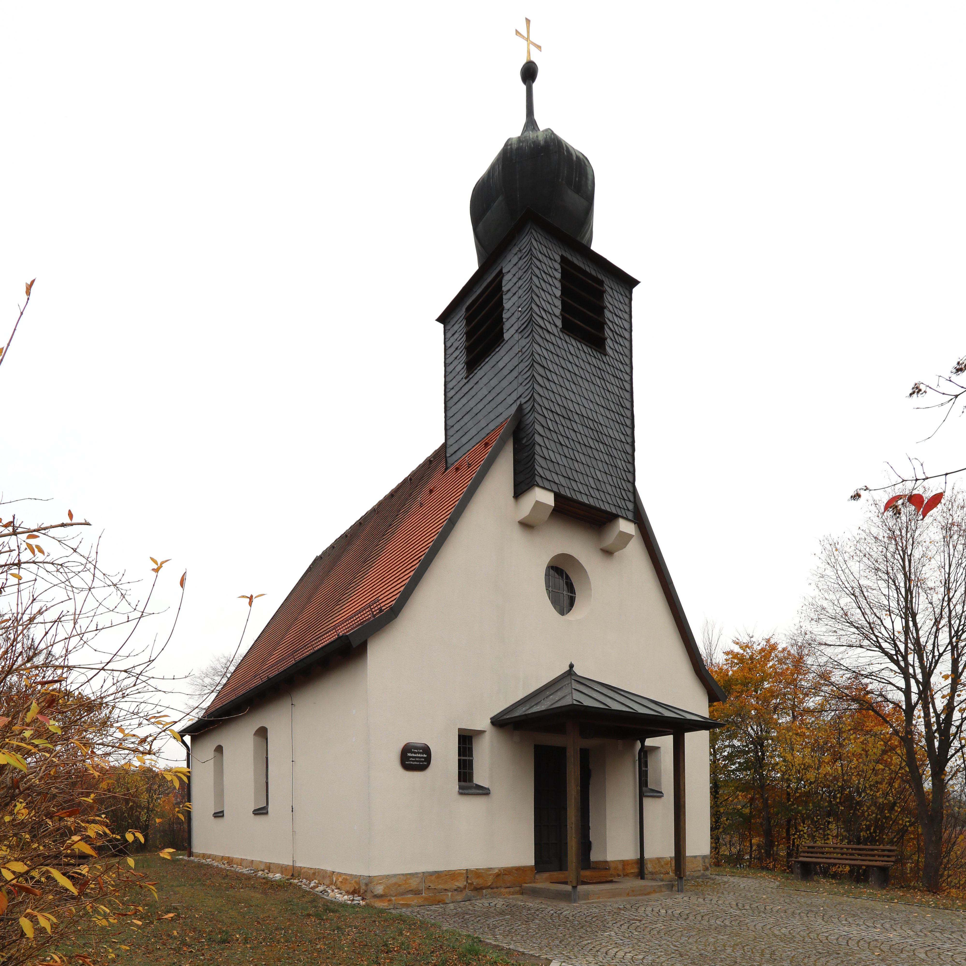 Michaelskirche in Rudendorf